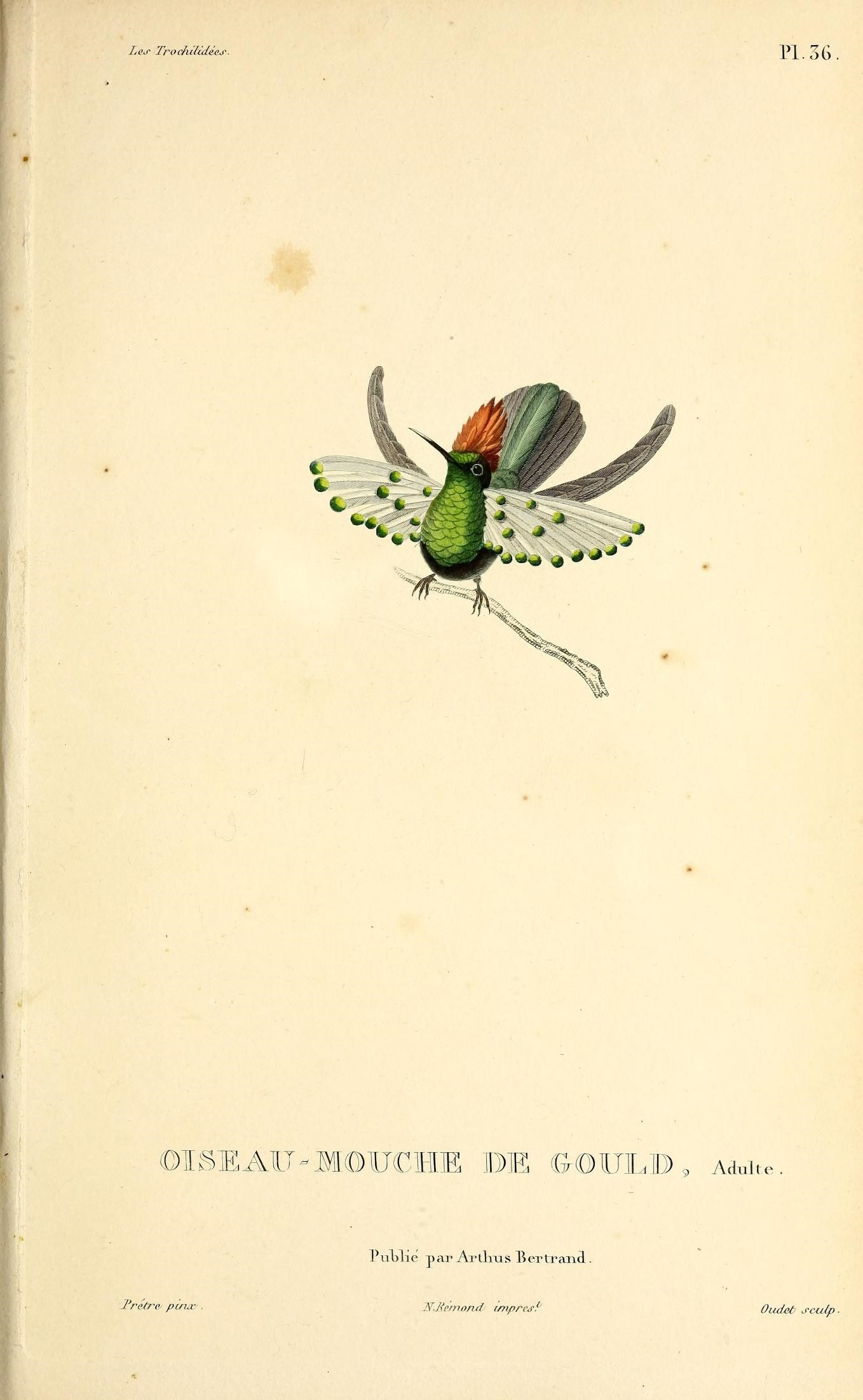 Les trochilidées :. Paris :A. Bertrand,[1832?].